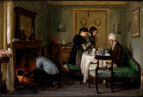 From left to right: P.C. Skovgaard, knealing by the fireplace, Georgia Skovgaard, Edele Birgitte Høyen, and N.L. Høyen.